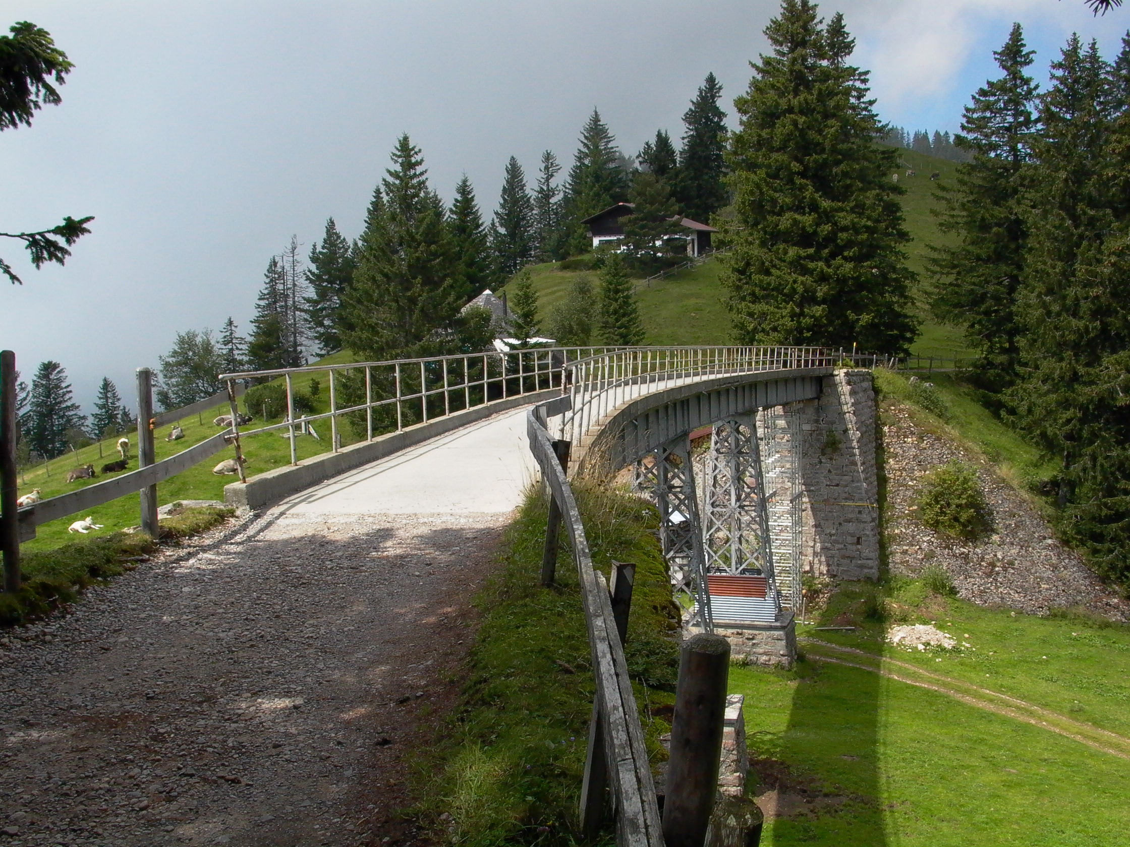 Ehemalige Rigi-Scheidegg Bahn, Brücke bei Unterstetten (2009_08_12)